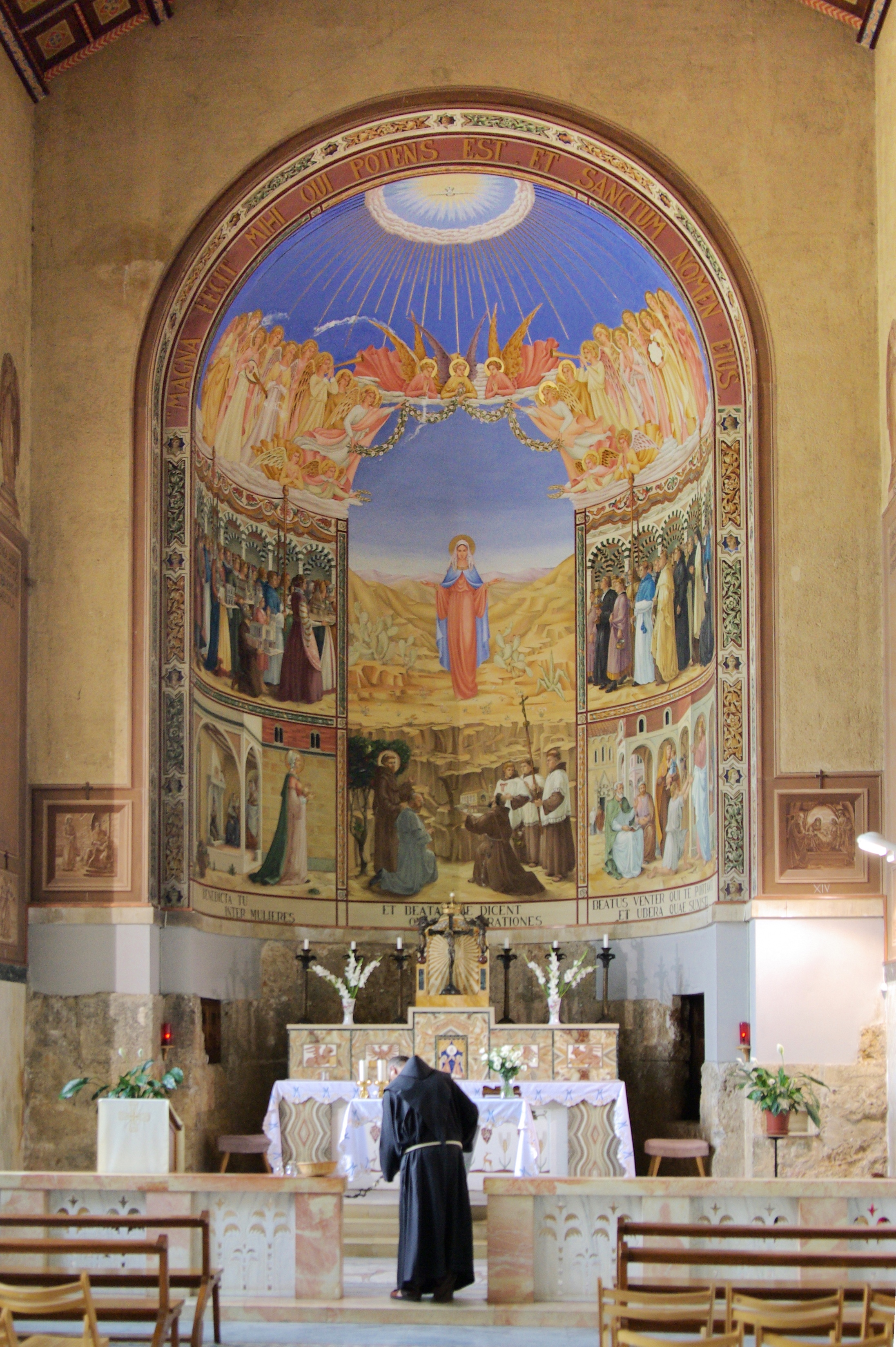 Ein Karem, Verkündigungskirche